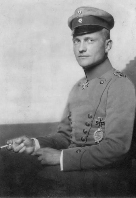 Scherl: Rittmeister Freiherr von Richthofen, Deutschlands erfolgreichster Kampfflieger. (Phot. Nicola Perscheid) 8872-17